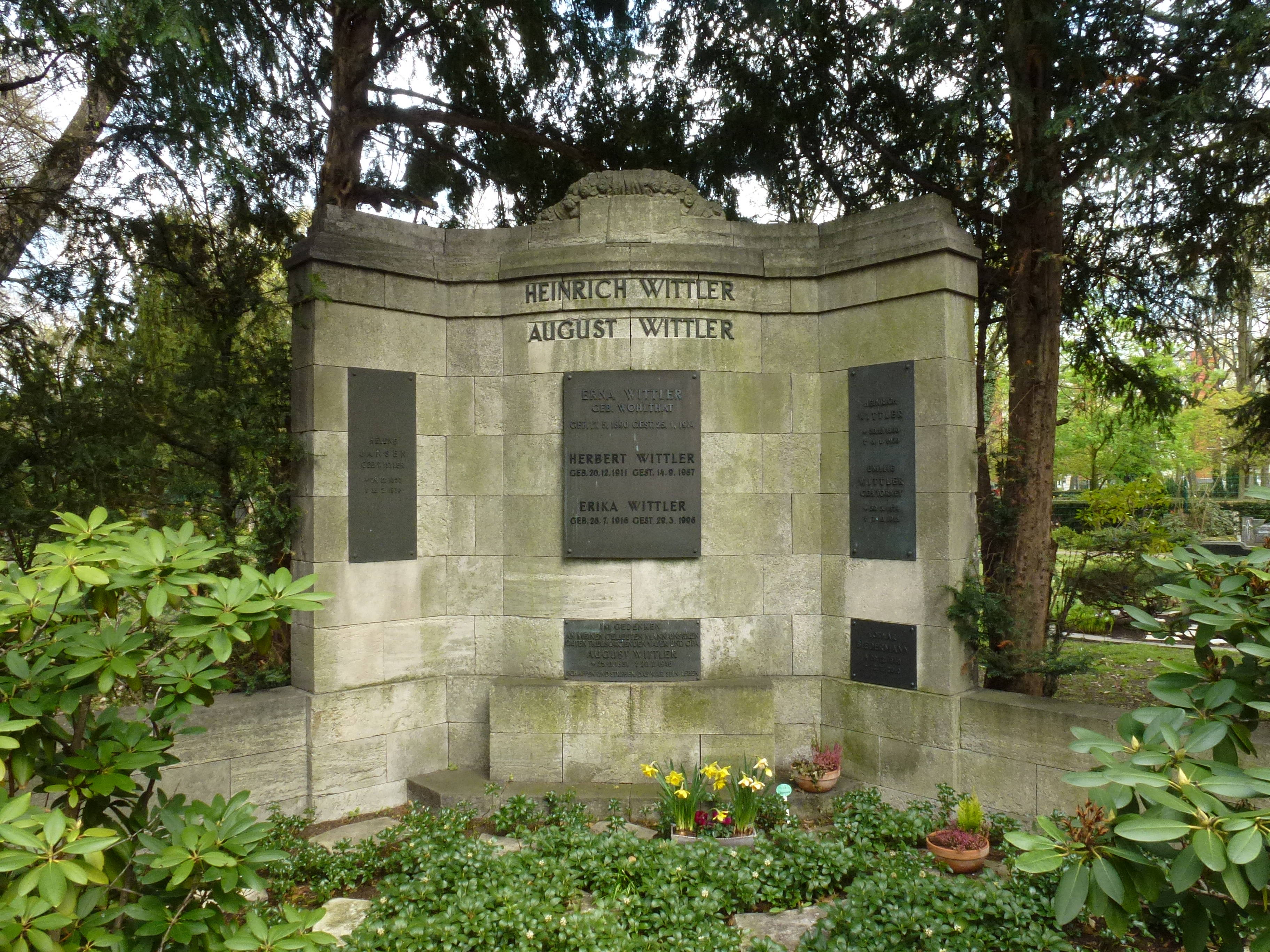 St. Philippus-Apostel-Kirchhof Grabmal Wittler